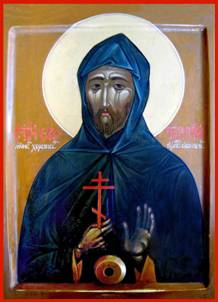 Икона преподобномученика Евстратия Печерского